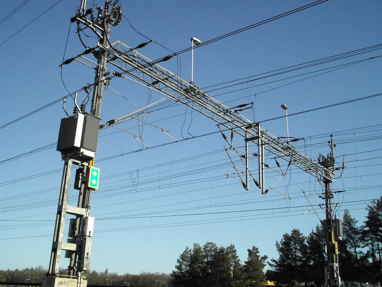 Sugtransformator.